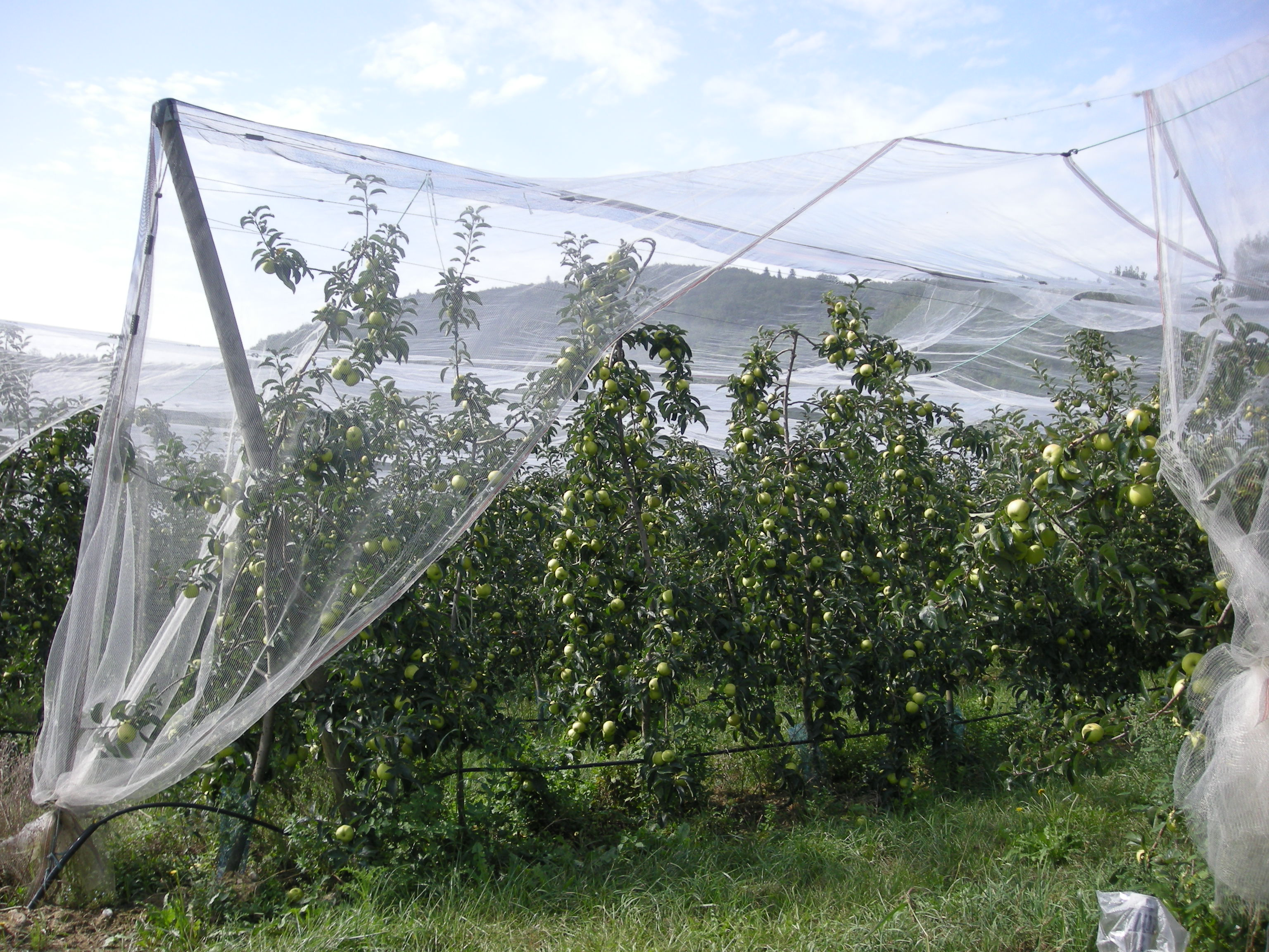 Vergers de pommiers à Sonnac-sur-l'Hers (Aude)